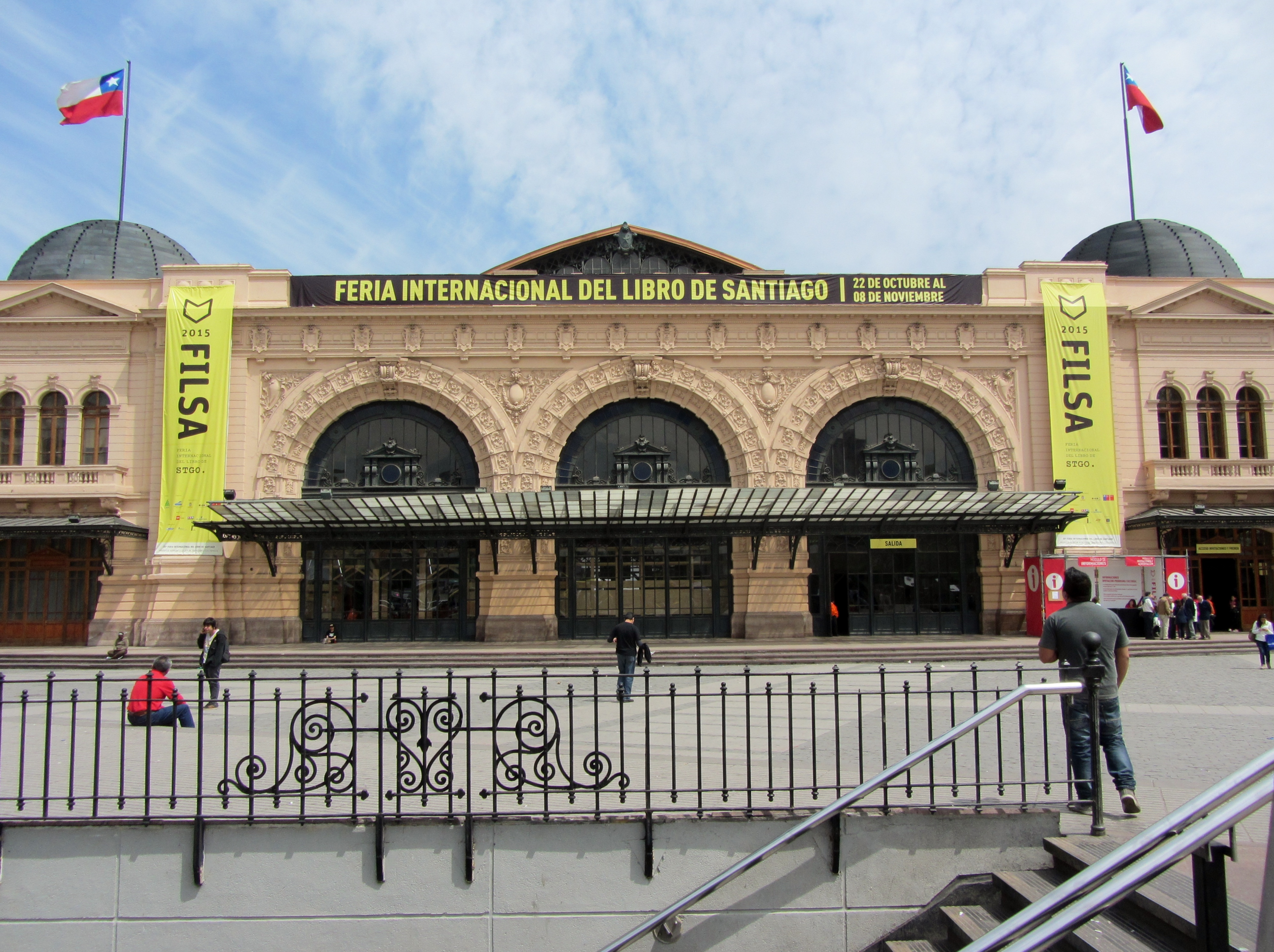 La boca del metro Cal y Canto y la Estación Mapocho, sede de la Feria Internacional del Libro de Santiago 2015